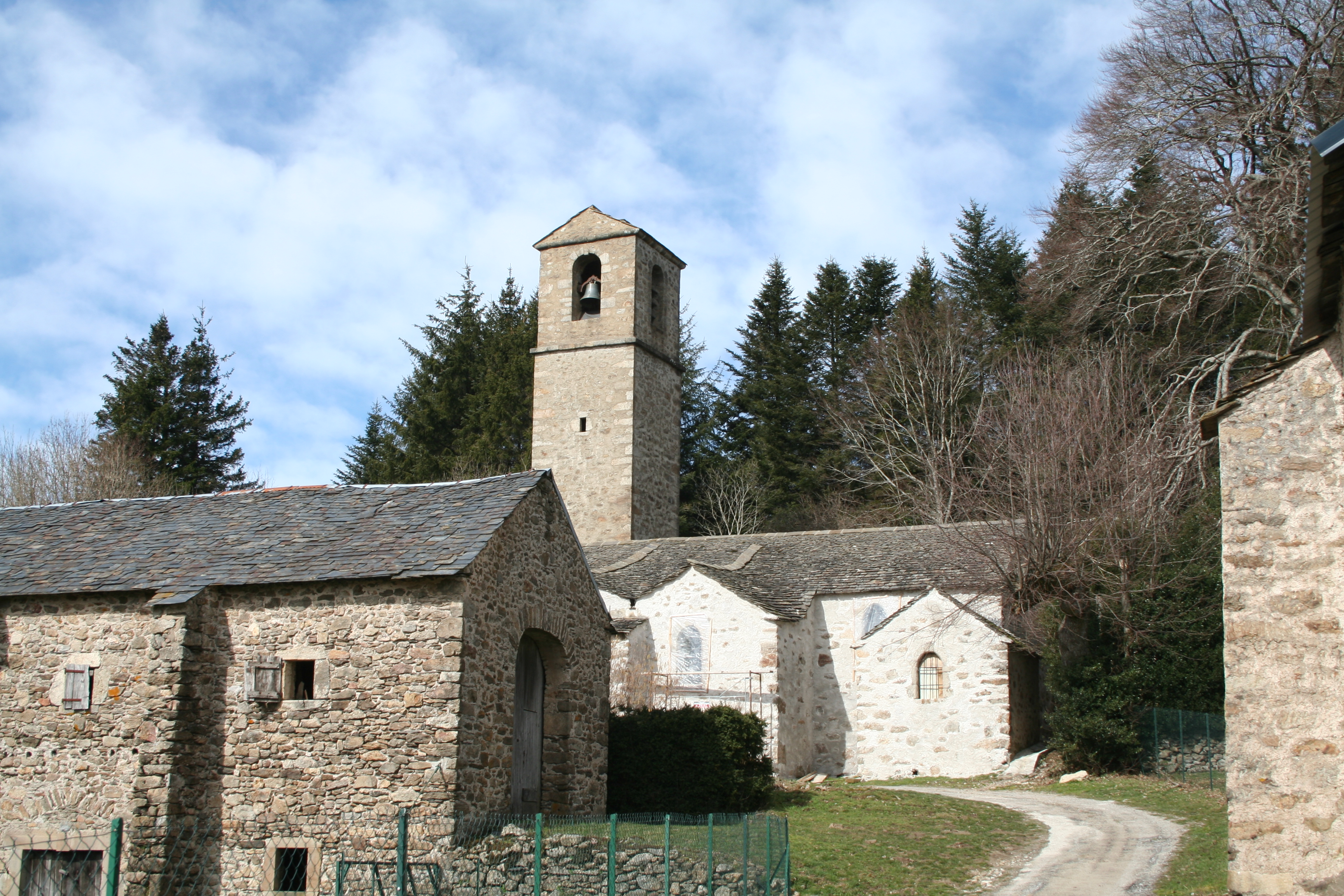 Église Saint-Pierre de Salvergues (édifiée en 1822) - commune de Cambon-et-Salvergues - Hérault)